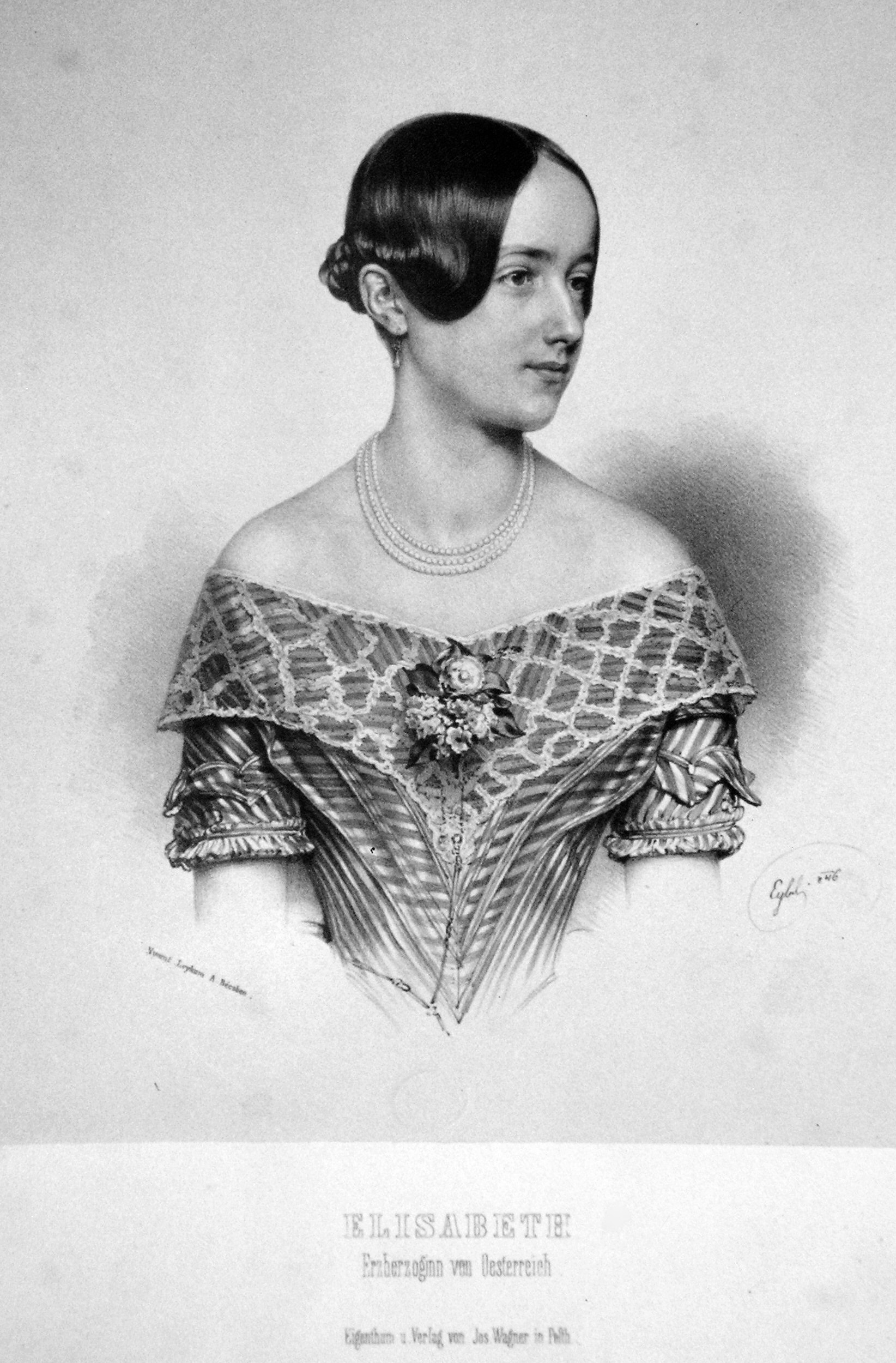 Elisabeth (1831-1903) Erzherzogin von Österreich. Lithographie von Franz Eybl, 1846